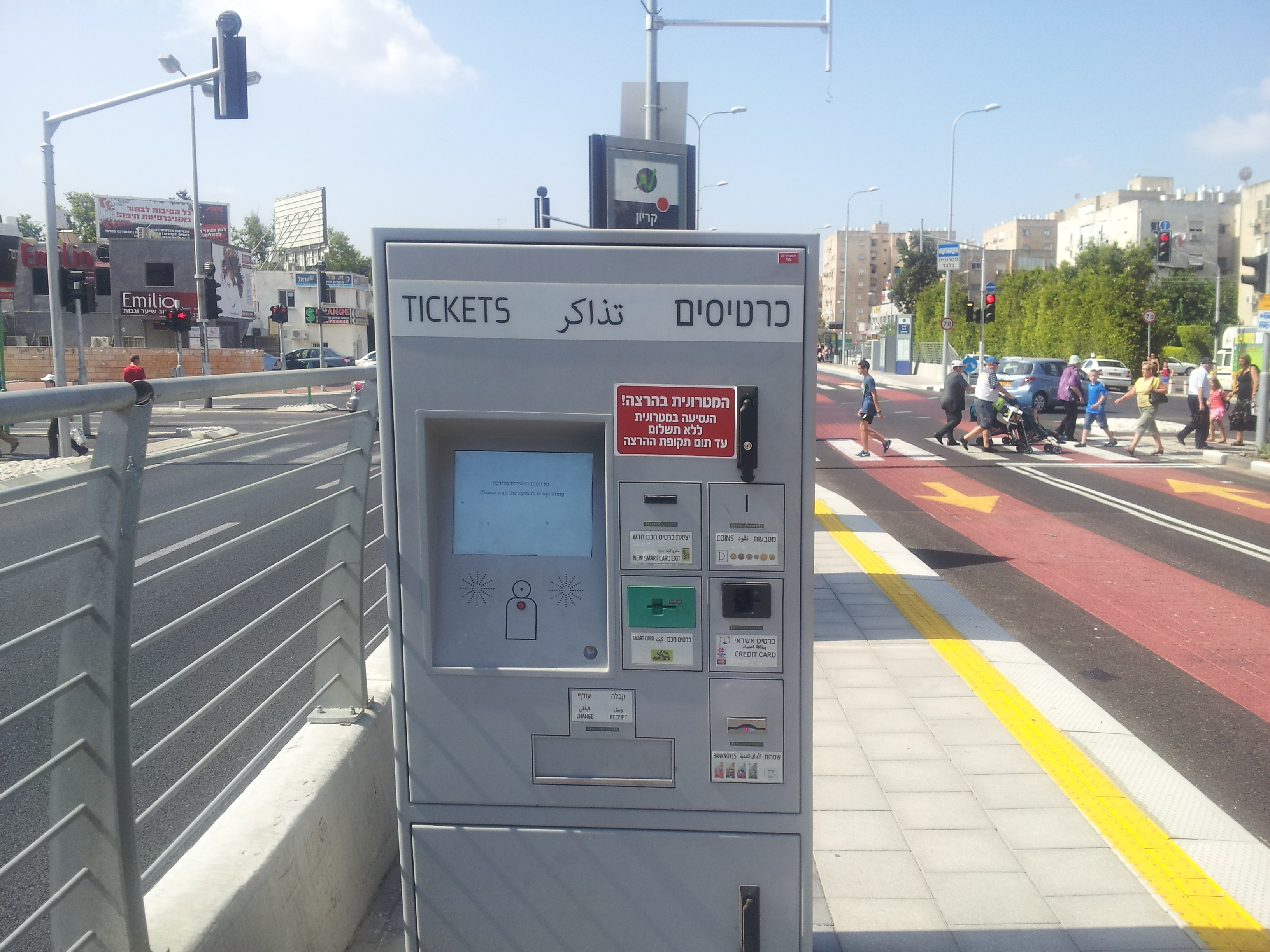 התשלום יתבצע בתחנות המטרונית. בתמונה:מכונת כרטוס בתקופת ההרצה ללא תשלום